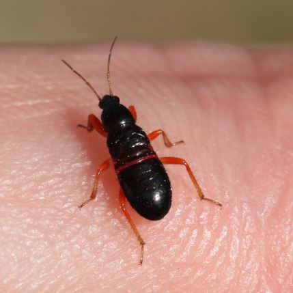 Nymphe von Prostemma guttula am 2. Juli 2018 an der Côte d’Azur